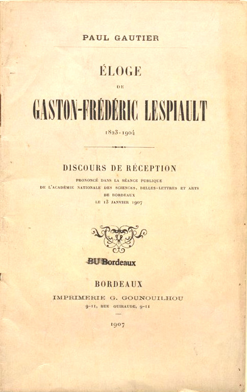 Éloge de Gaston-Frédéric Lespiault, 1823-1904 par Paul Gautier : discours de réception prononcé dans la séance publique de l'Académie nationale des sciences, belles-lettres et arts de Bordeaux, le 13 janvier 1907.